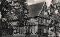 Die alte Amtspforte in Stadthagen